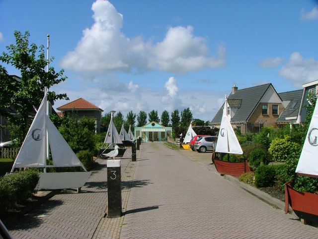 RIEDSTERMERKE STRAATVERSIERING 2e PRIJS SUDEROM